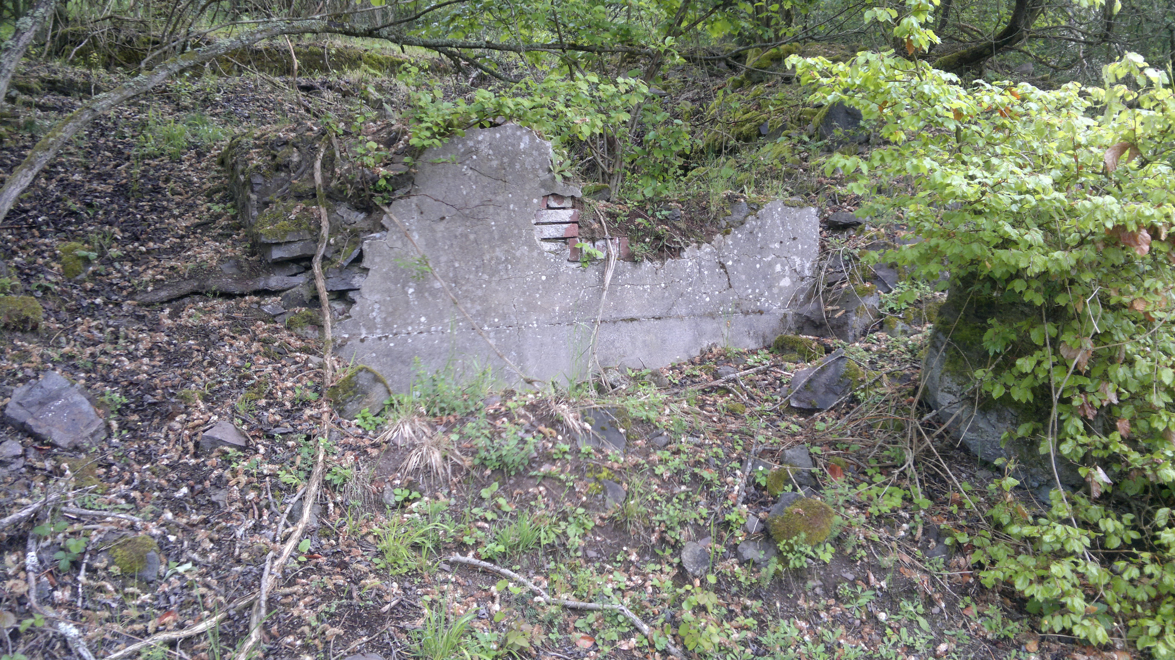 Hausruine im ehemaligen Ort Ronnenberg auf dem Truppenübungsplatz Baumholder; Wüstung